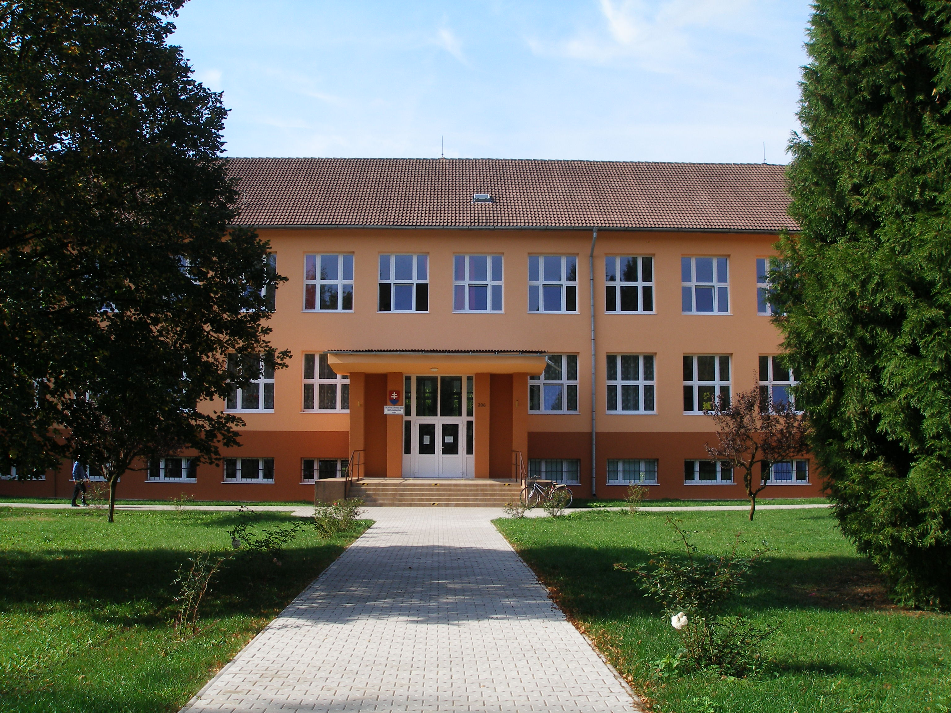 Základní škola s mateřskou školou Ľudovíta Vladimíra Riznera v Bošáci (pohled od severovýchodu).